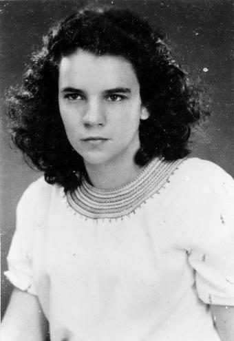 זהרה לביטוב, לוחמת פלמח